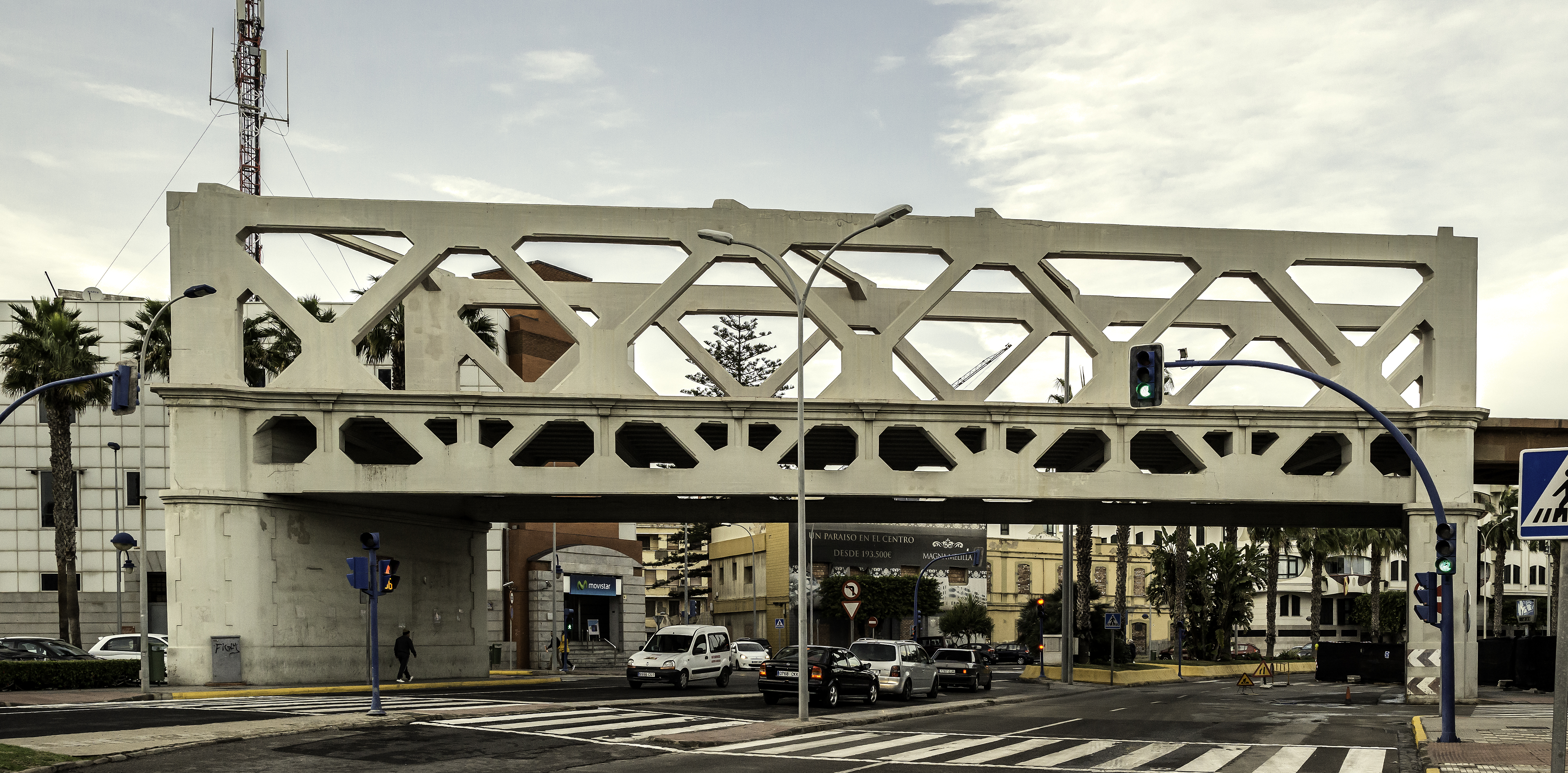 El Viaducto de la CEMR es un viaducto de la arquitectura industrial situado sobre la Avenida de la Marina Española de Melilla (España), y forma parte del Conjunto Histórico Artístico de la Ciudad de Melilla, un Bien de Interés Cultural.